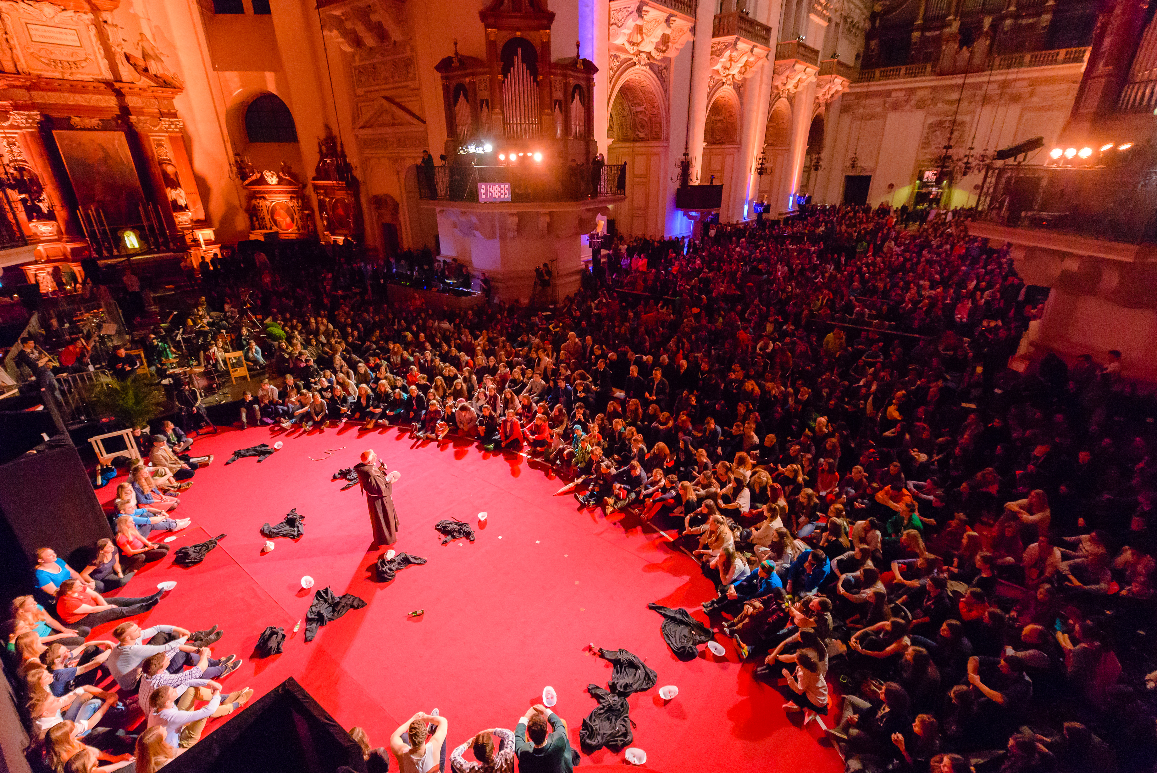 Jugendliche sitzen am Boden